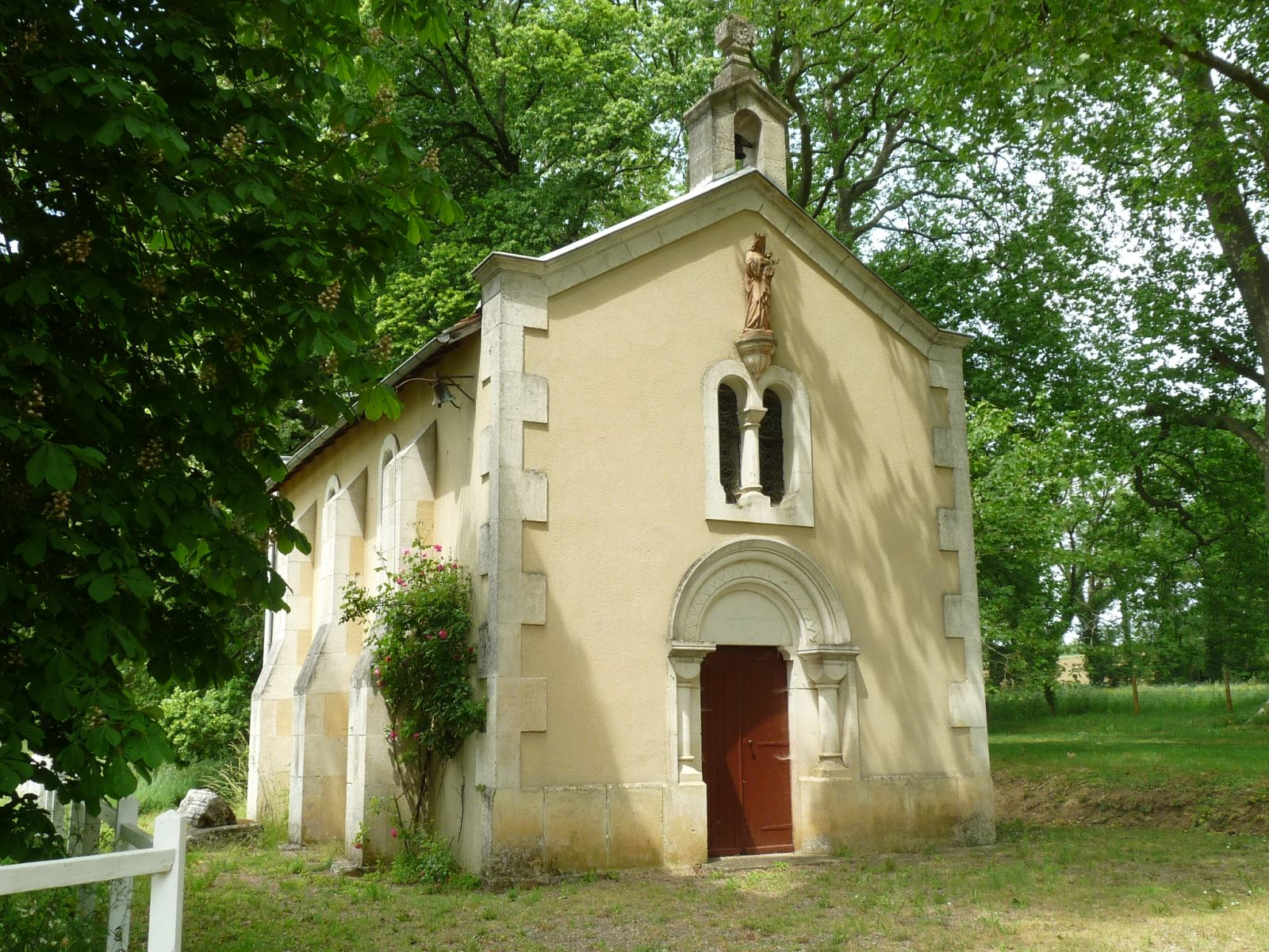 chapelle du Rhus, Lésignac, St-Maurice-des-Lions, Charente, France